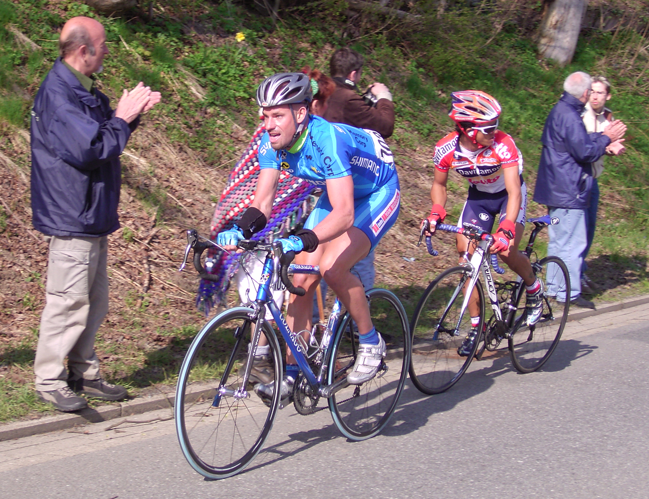 Stefan Schumacher vor Mauricio Ardila bei seinem entscheidenden Angriff auf der Schlussetappe der Niedersachsen-Rundfahrt 2005 in Sankt Andreasberg